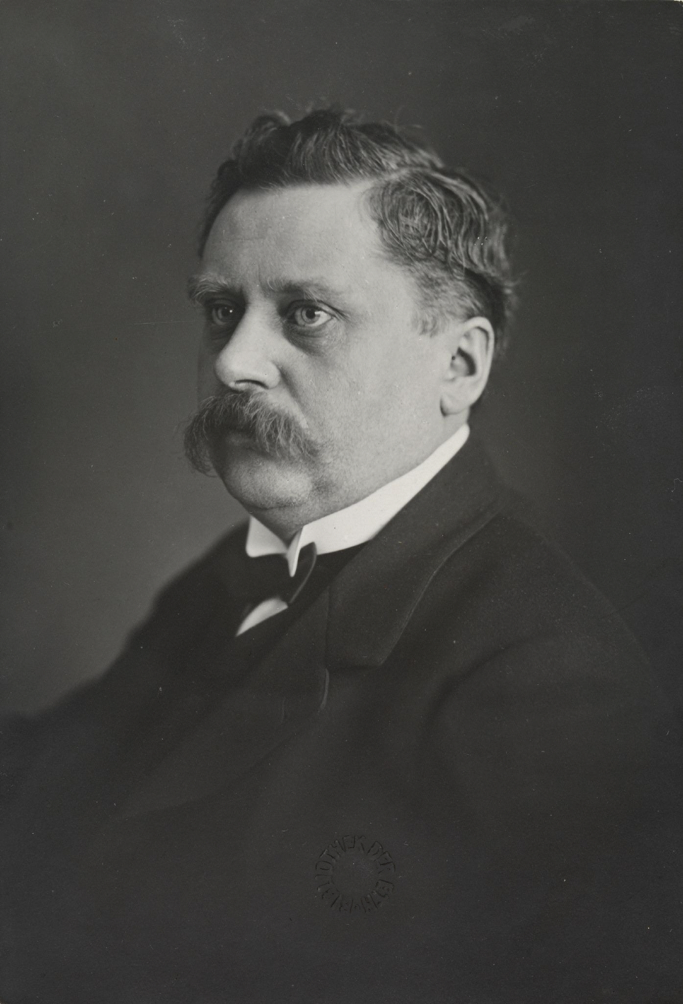 Porträt von Alfred Werner